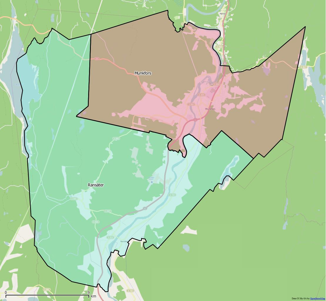 Distriktsindelningen i Munkfors kommun World file: 31.84094845464422008 0 0 -31.84094845464422008 1485381.75014677201397717 8374673.59901087265461683